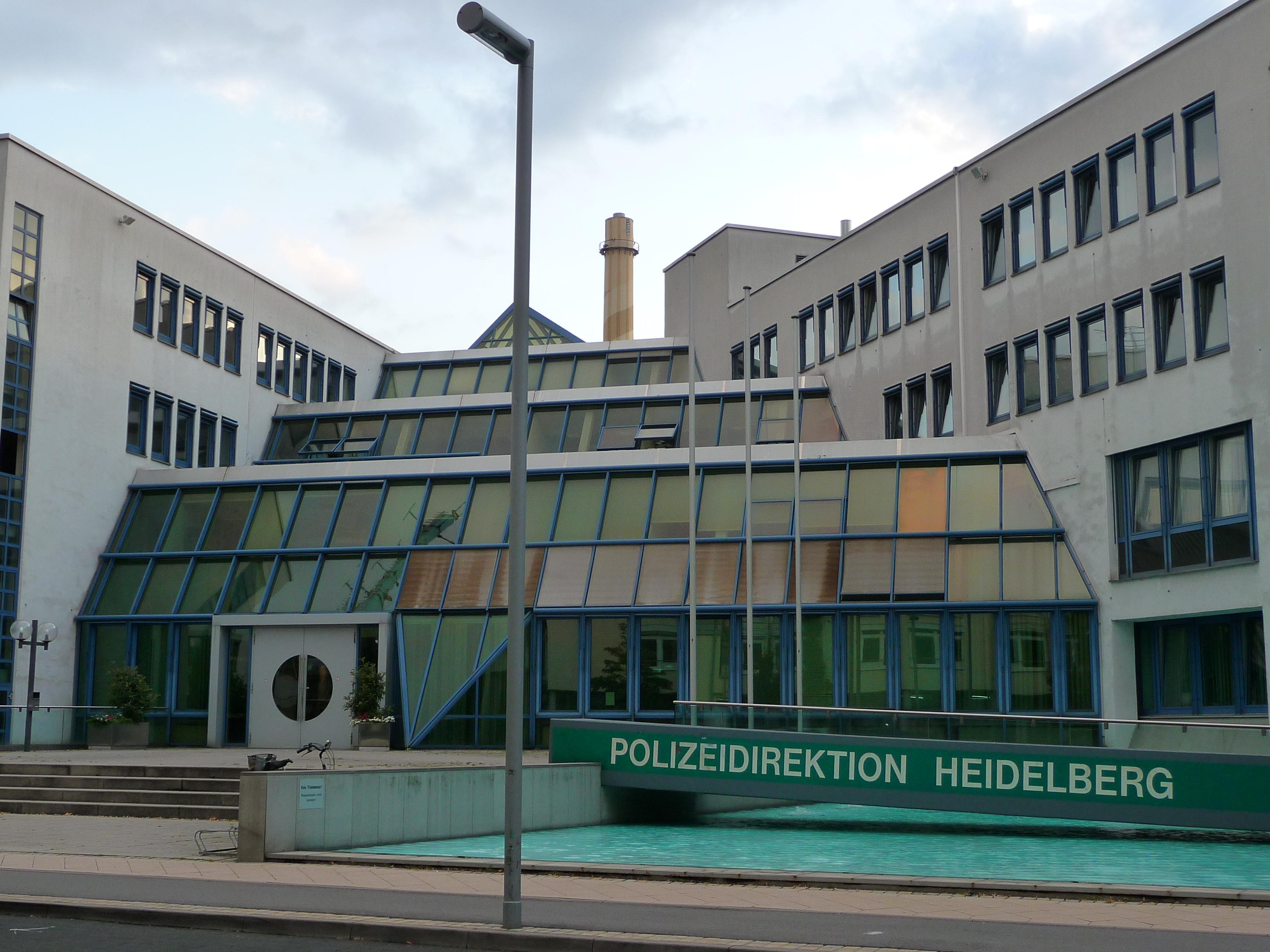 Haupteingang der Polizeidirektion in Heidelberg (Baden-Württemberg, Deutschland)